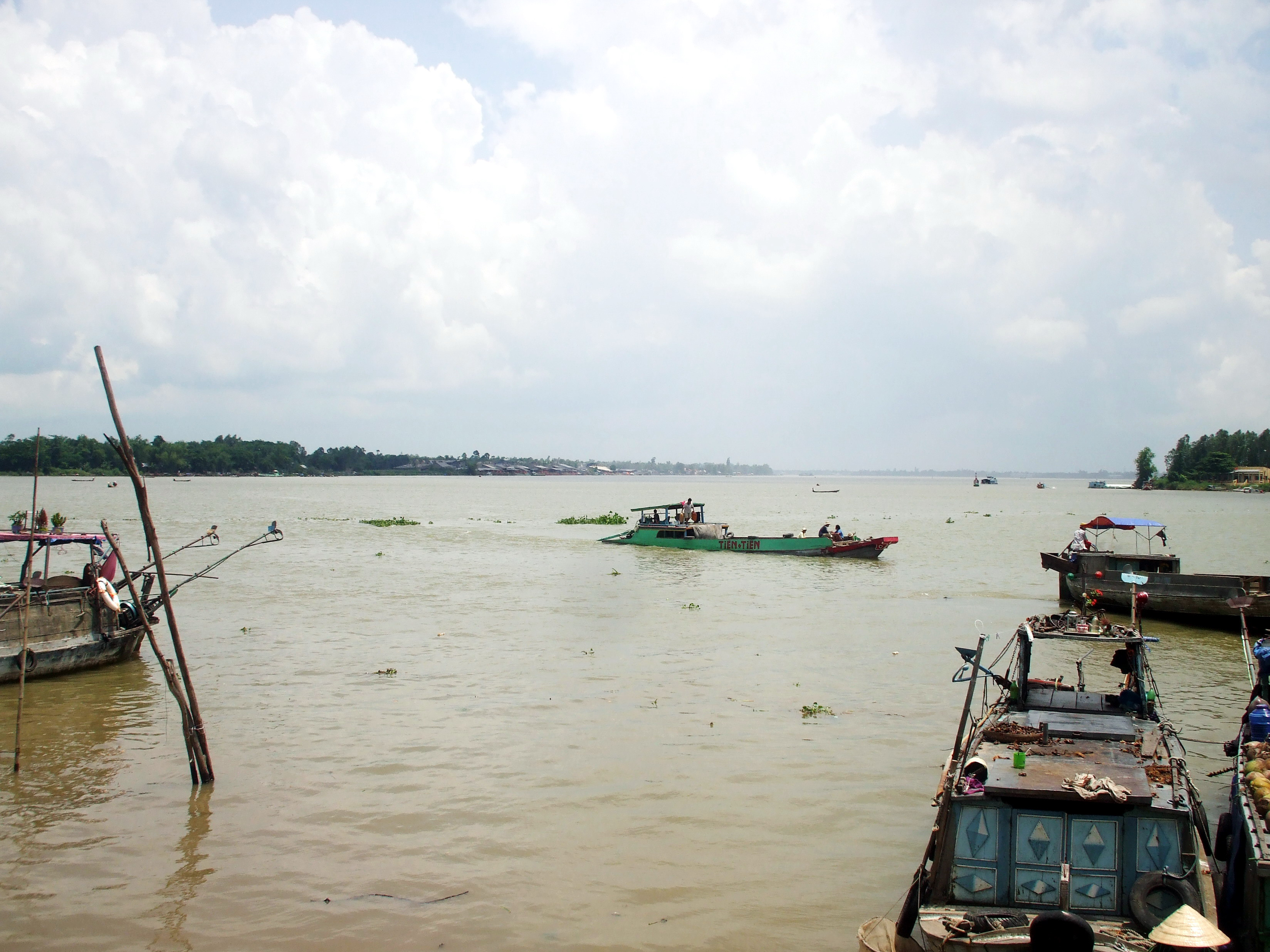 Chỗ tiếp giáp sông Hậu với sông Vàm Nao, thuộc huyện Phú Tân, tỉnh An Giang (Việt Nam).